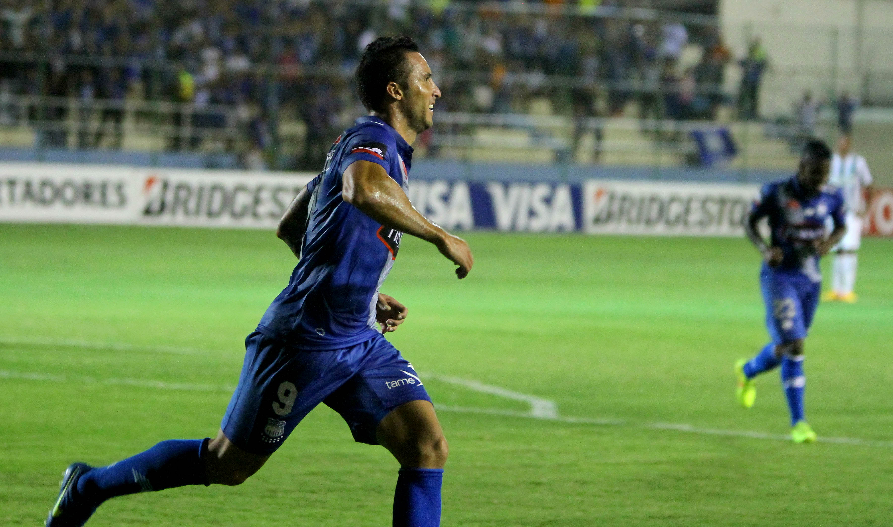 Manta, 07 de may (Andes).-Emelec enfrenta a Atlético Nacional de Medellin por los Octavos en la Copa Libertadores Foto:César Muñoz/Andes